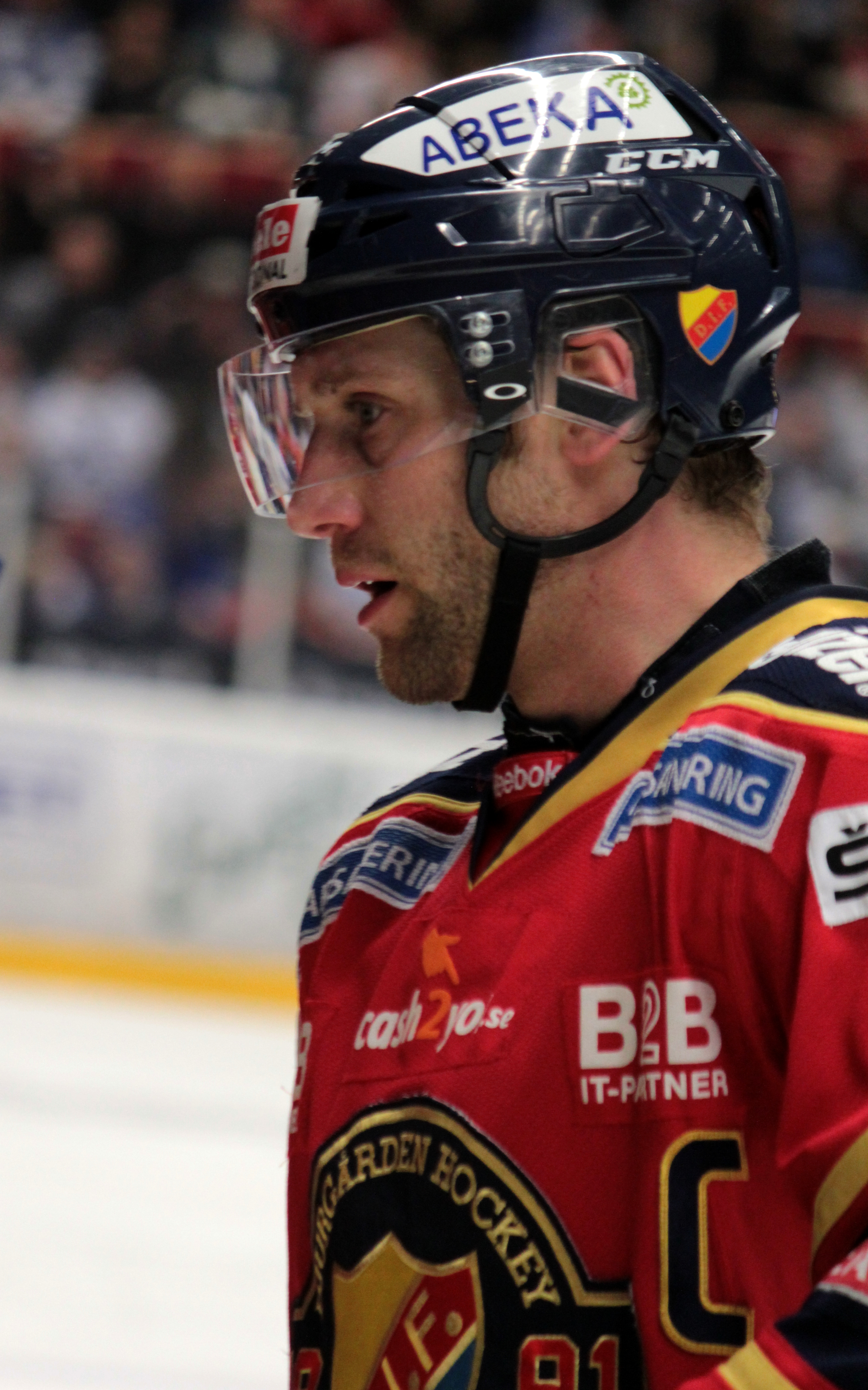 Marcus Nilson i kvalmatchen mellan Leksands IF och Djurgårdens IF i Leksand 2012-03-31